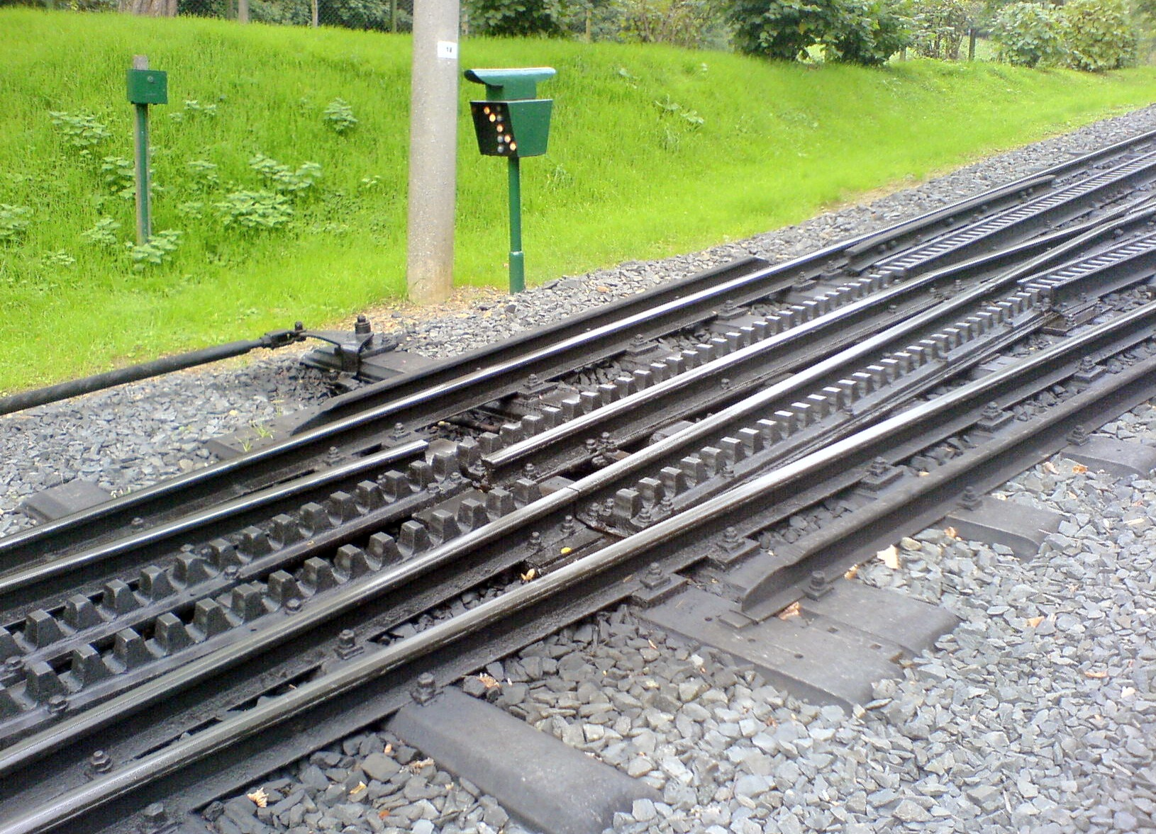 Srdcovka ozubnice pro Riggengachovu ozubnici (možno i pro Strubovu)